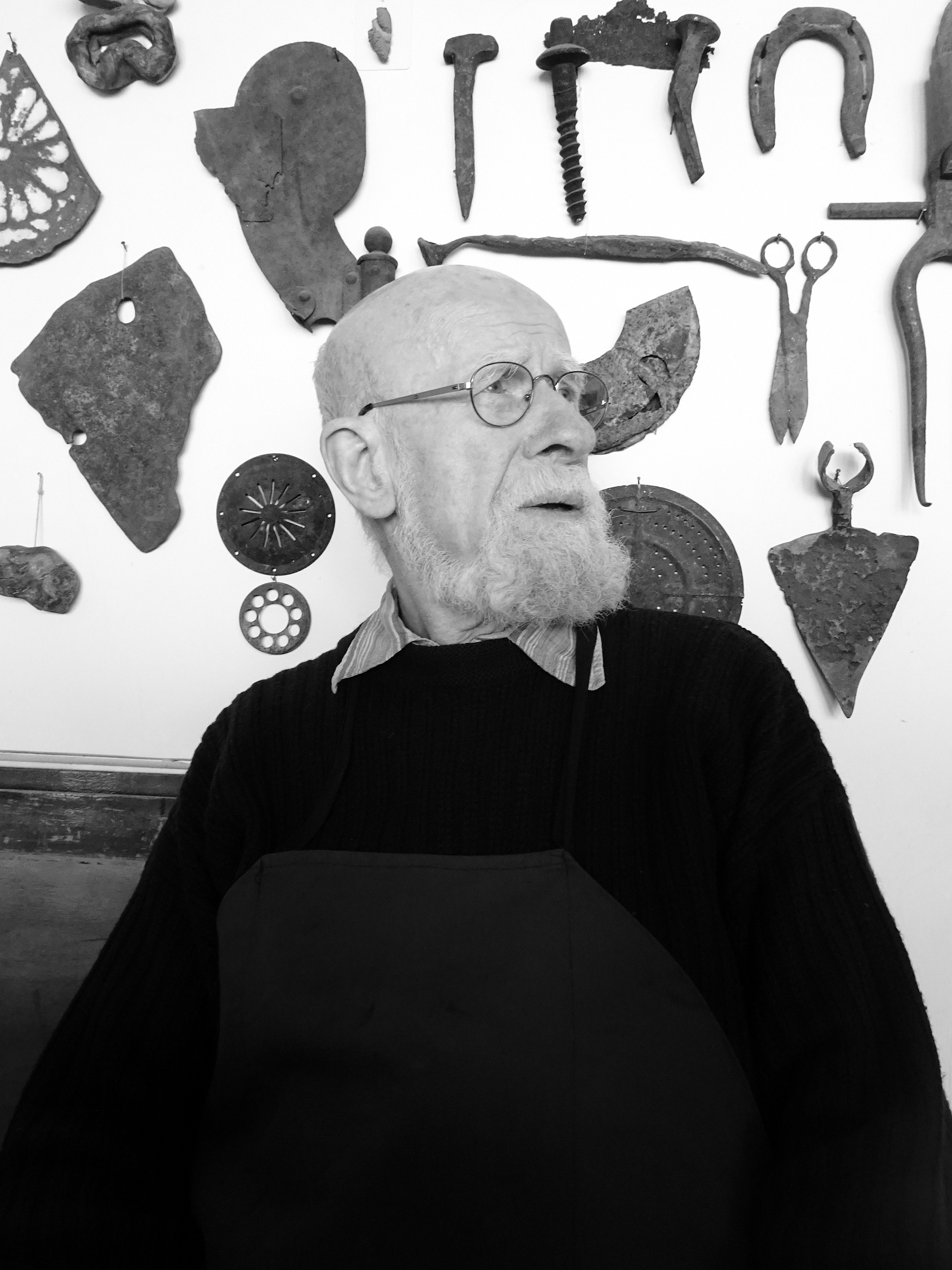 Heinrich HeuerDepicted person: Heinrich Heuer – Austrian artist